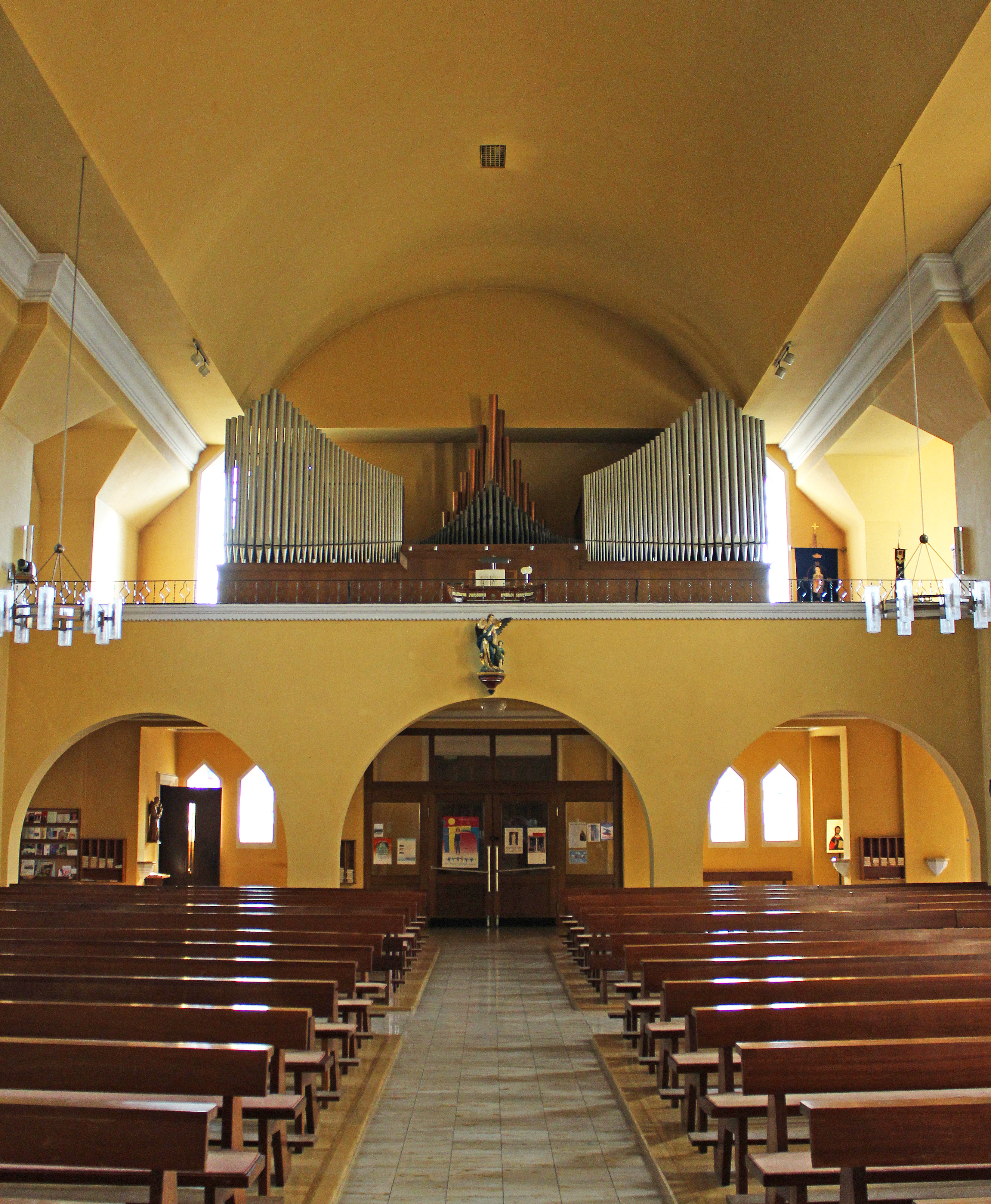 Blick ins Innere der katholischen Pfarrkirche St. Bonifatius in Püttlingen, Regionalverband Saarbrücken, Saarland